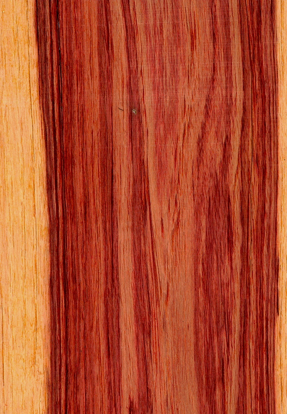 Bahia Rosenholz ist eine gelbliches bis rosa gefärbte, rot gemaserte Holzart, die sich durch rosenähnlichen Duft auszeichnet. Es wird traditionell unter der französischen Bezeichnung bois de rose gehandelt. (die "Kratzer" quer zur Textur sind Messerscharten. Sie werden bei der Veredelung durch Schleifen entfernt.